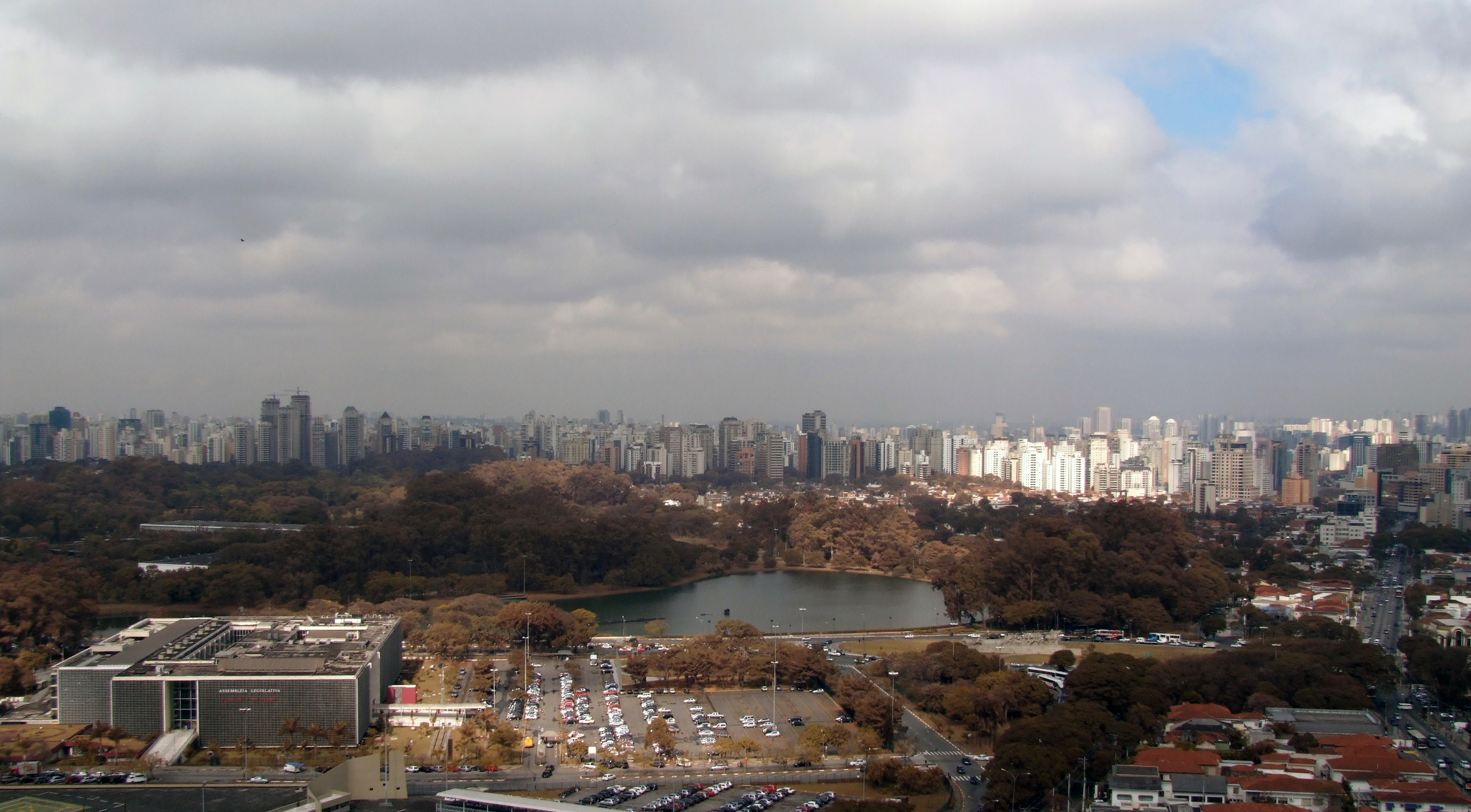 Assembleia Legislativa de São Paulo e Parque Ibirapuera